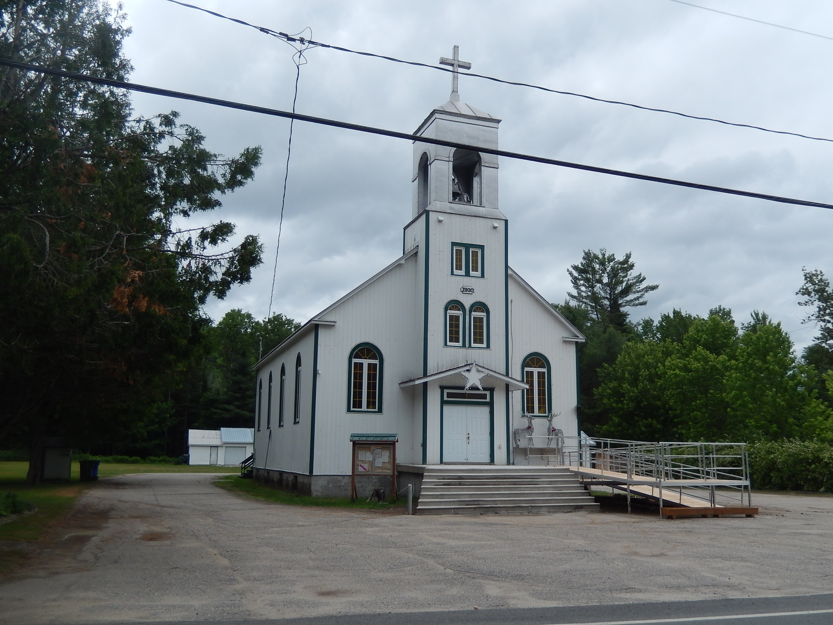 Église Notre-Dame-du-Mont-Carmel de Duhamel en juin 2020.